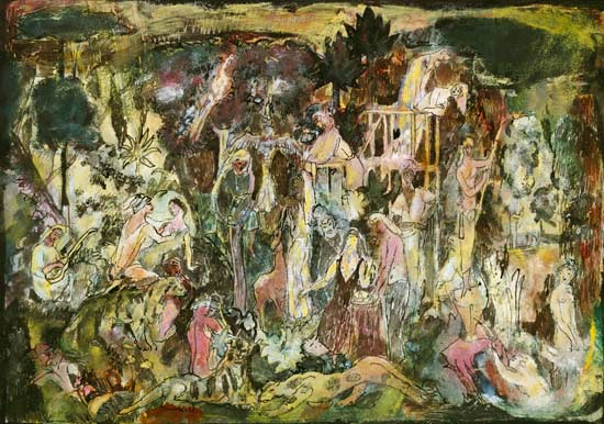 Eugen von Kahler: Liebesgarten, 1910/11, Deckfarben/Tusche/Feder, 27 x 19 cm, Städtische Galerie im Lenbachhaus, München